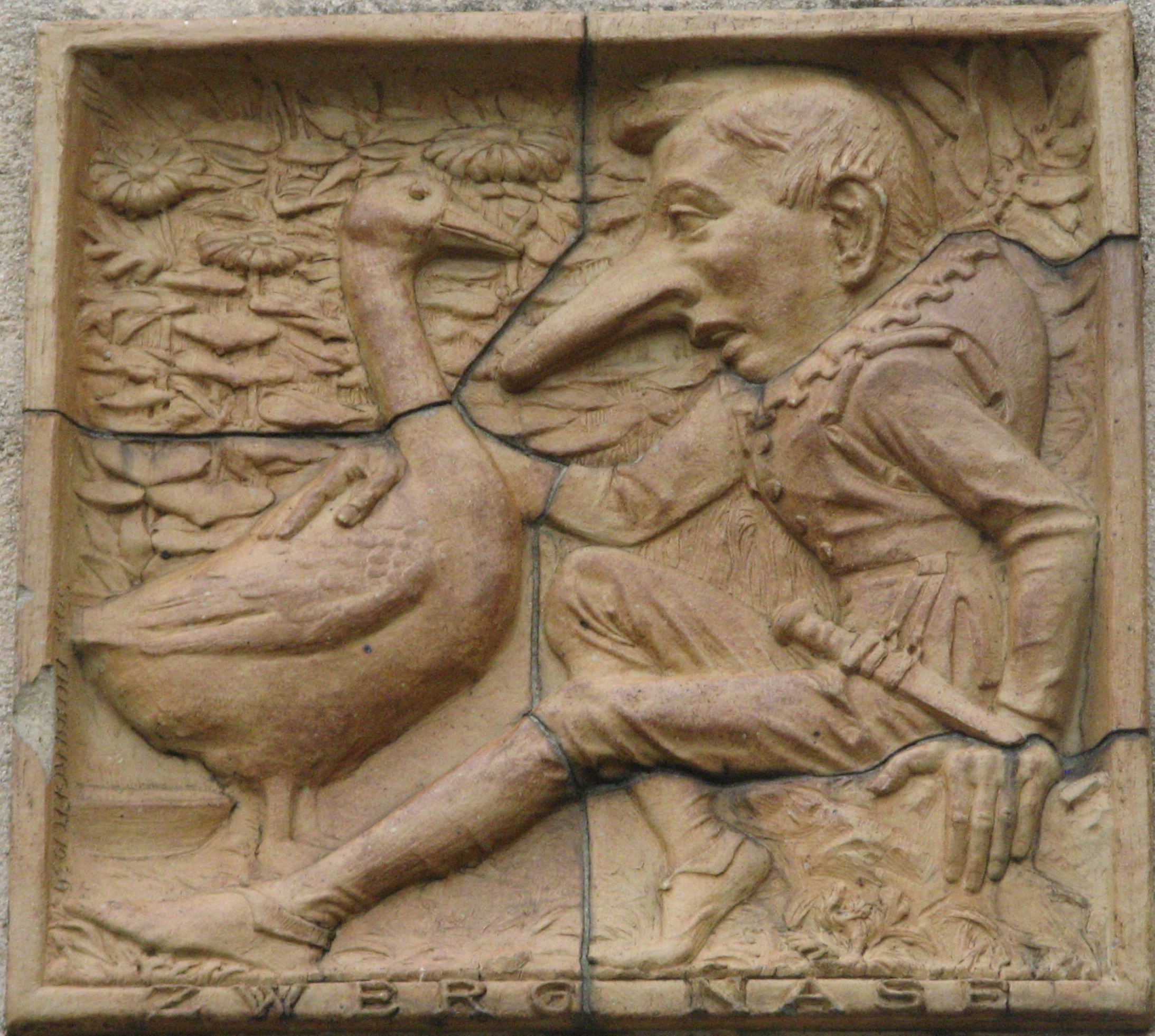 Zwerg Nase (1939), Terrakottarelief, Johann-Mithlinger-Siedlung, Raxstraße 7-27, Wien-Favoriten